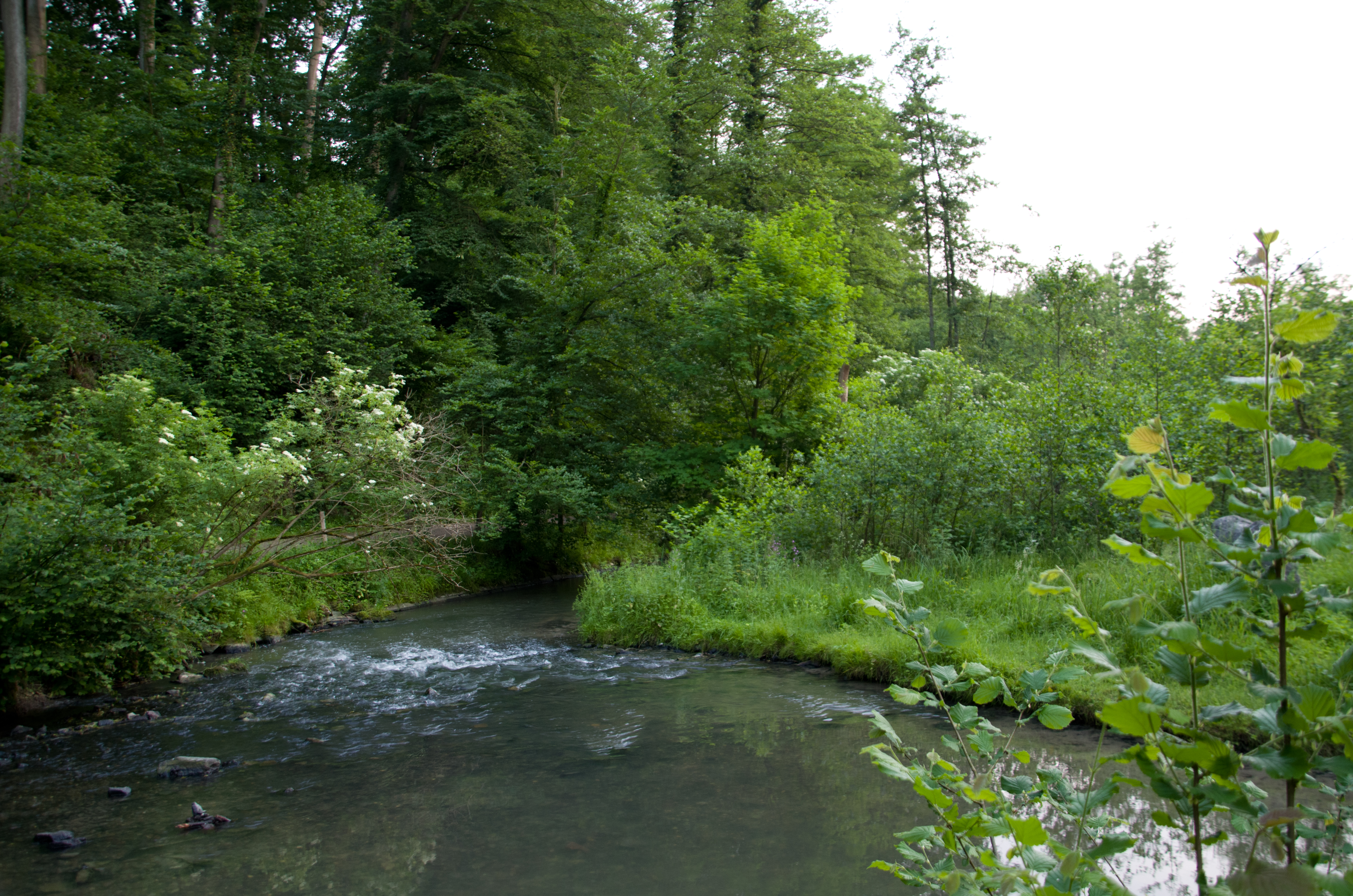 Die Anger im Naturschutzgebiet „Angertal“ in Ratingen, Kreis Mettmann